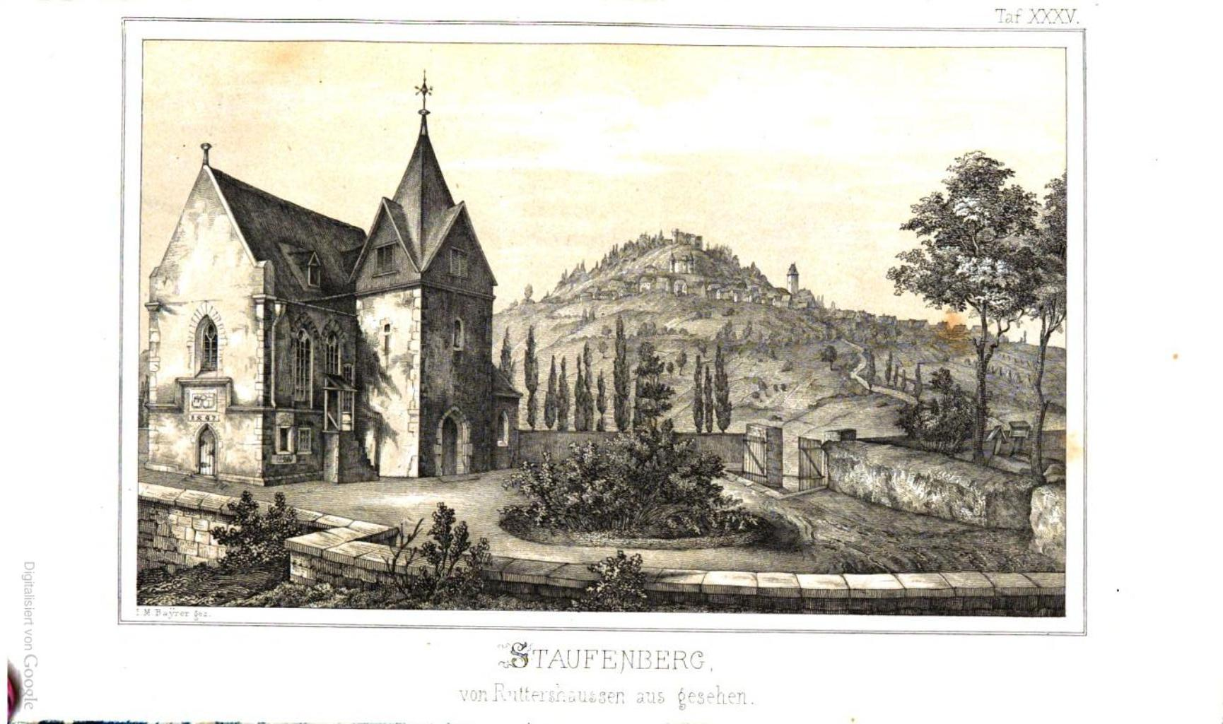 Staufenberg von Ruttershausen gesehen um 1850